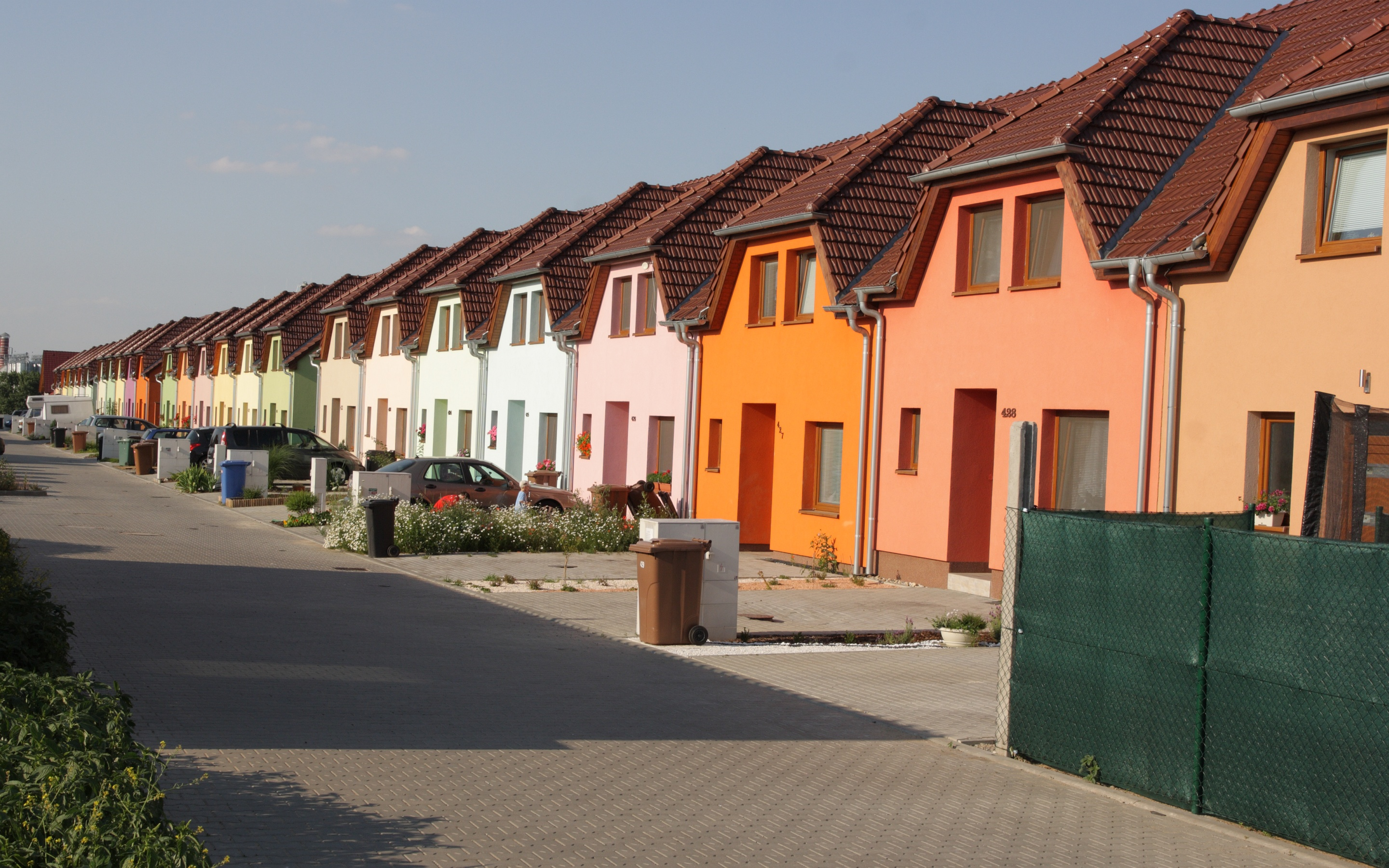 Holasice - nová zástavba západně od silnice II/425 (ulice Brněnská).